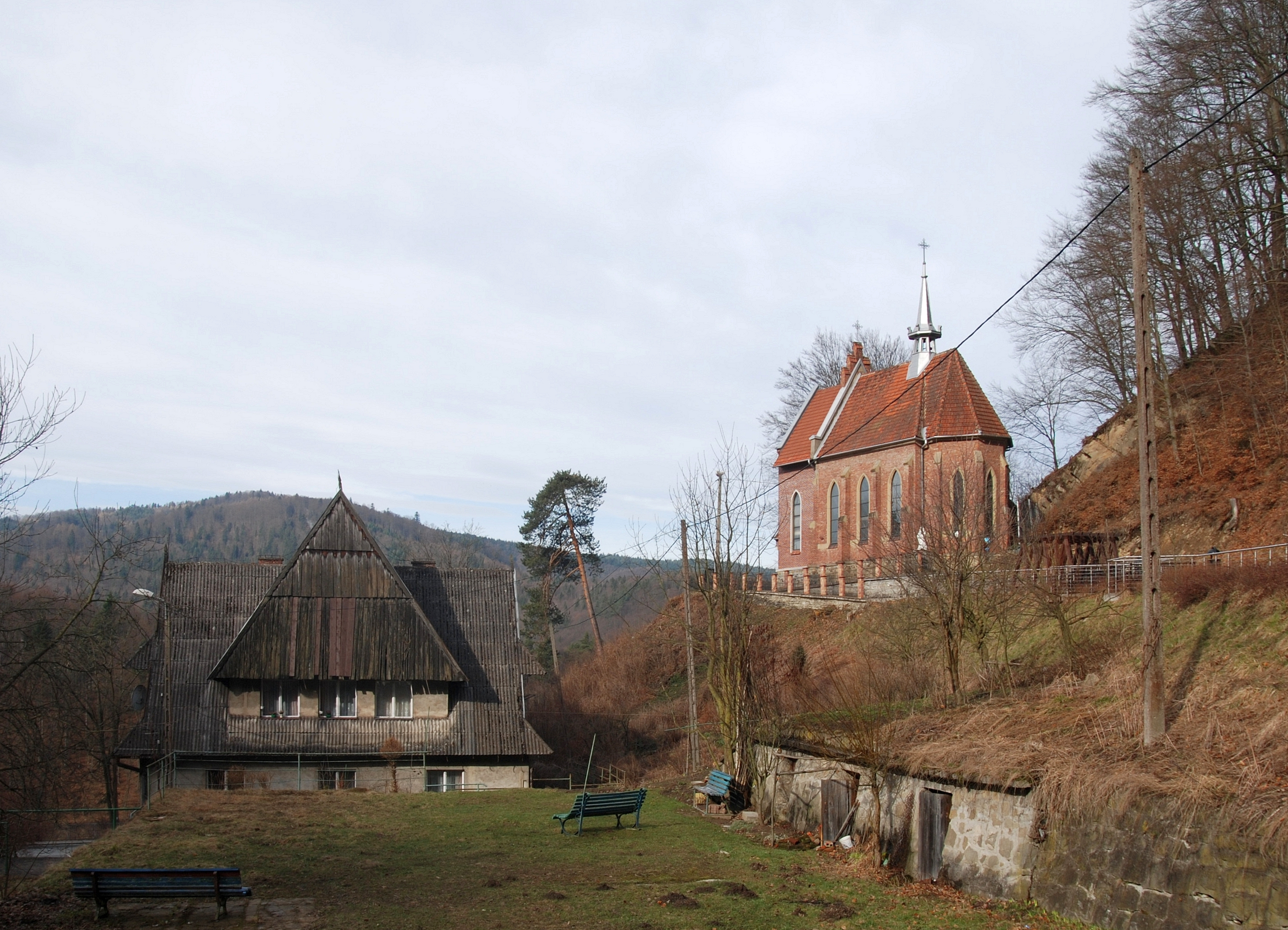 osada Żegiestów-Zdrój